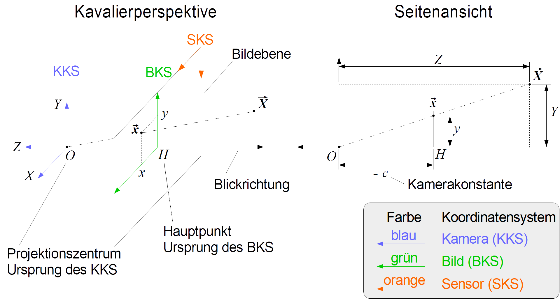 Diese Abbildung beschreibt die Abbildung eines 3D-Punktes in die Bildebene durch Zentralprojektion als idealisiertes Abbildungsmodell einer Kamera (Lochkamera). Die Abbildung ist geteilt in zwei Ansichten derselben Situation: Kavalierperspektive (links) und Seitenansicht (rechts). Version mit Beschriftung.